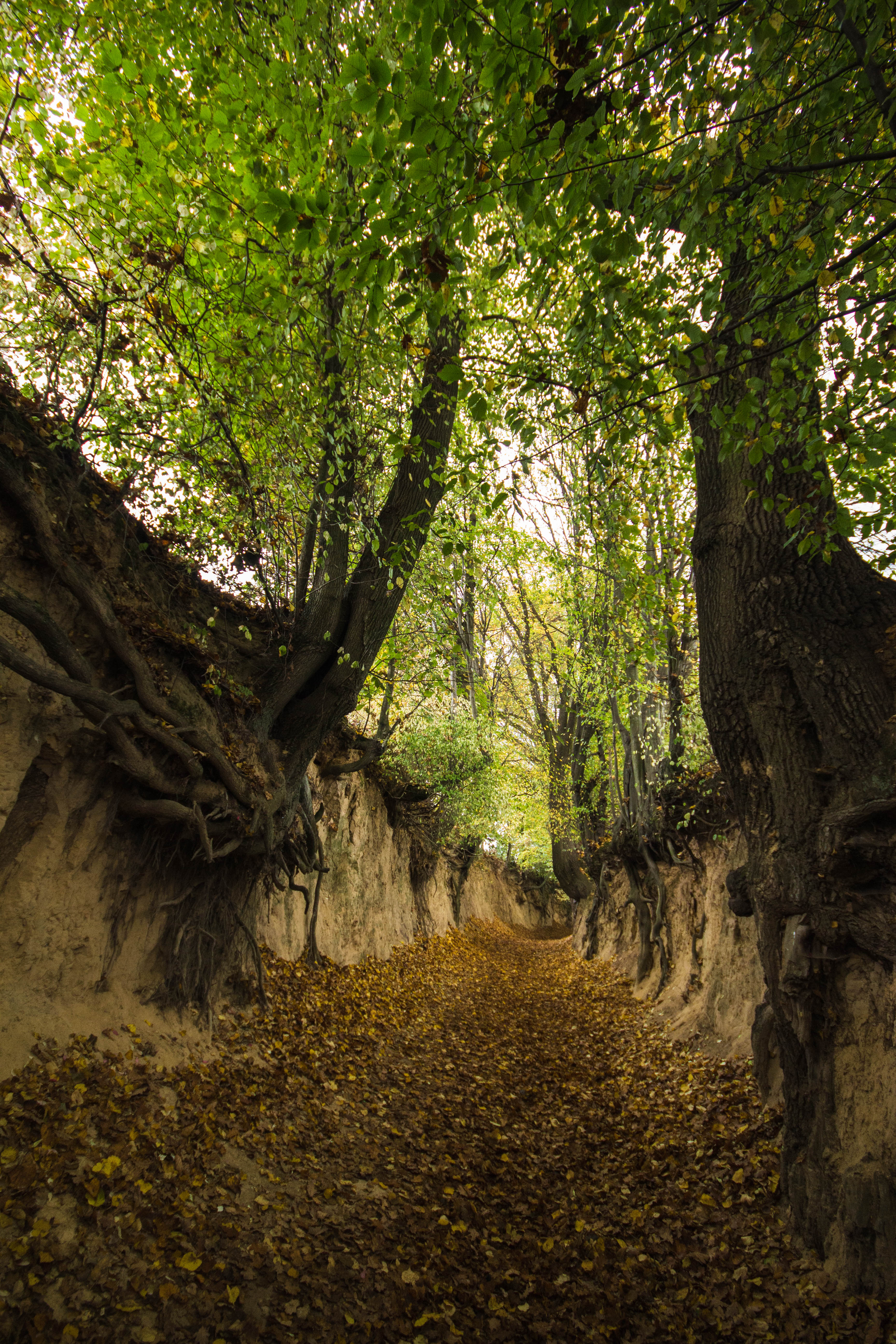 Park krajobrazowy Kazimierski Park Krajobrazowy.